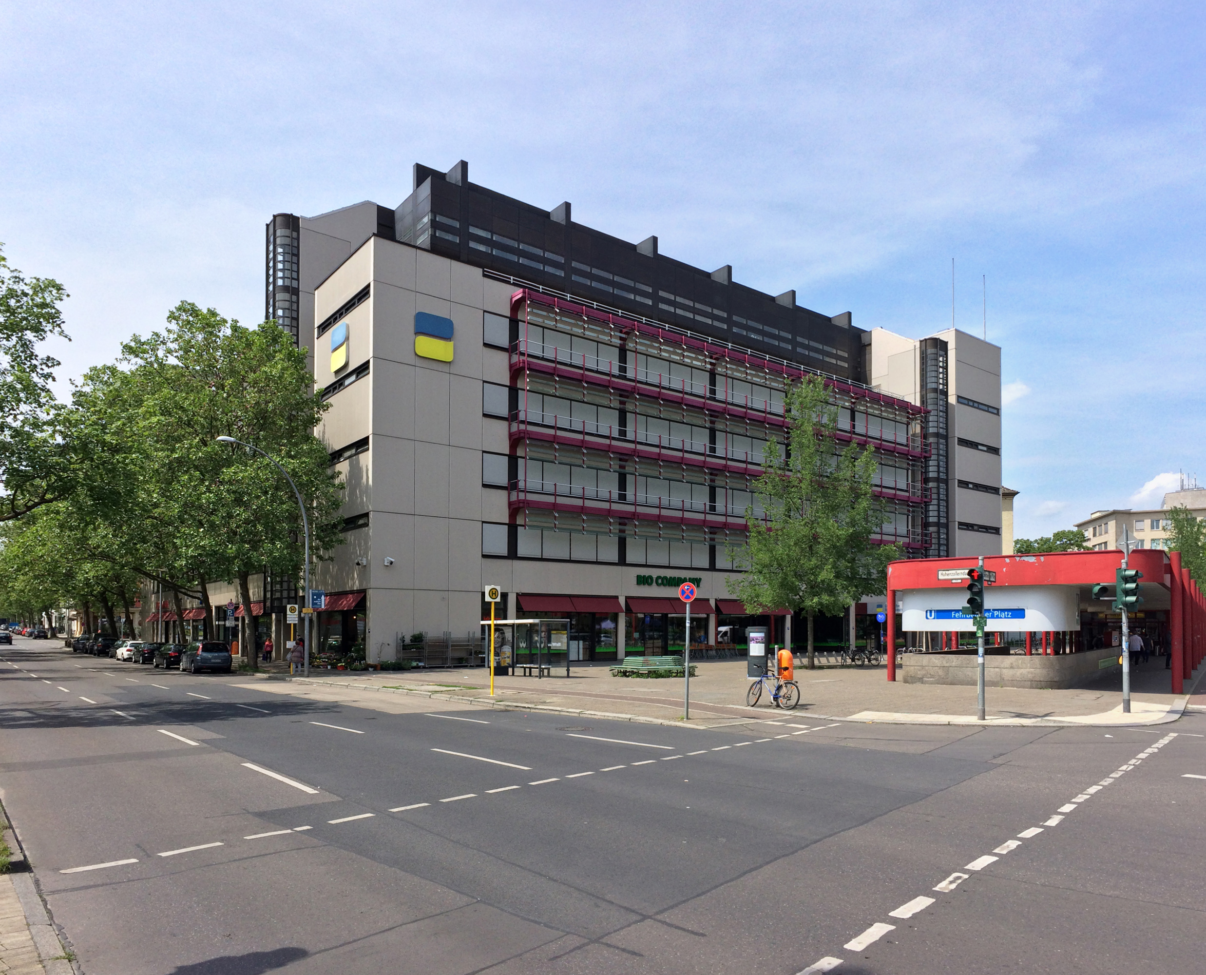 Deutsche Rentenversicherung Bund Berlin, ehemals Bundesversicherungsanstalt für Angestellte, Fehrbelliner Platz, Berlin-Wilmersdorf, 1970–1973, Rave und Rave Architekten (Jan Rave, Rolf Rave, Harald Schöning, Hans-Joachim Knöfel, Dieter Meisel)